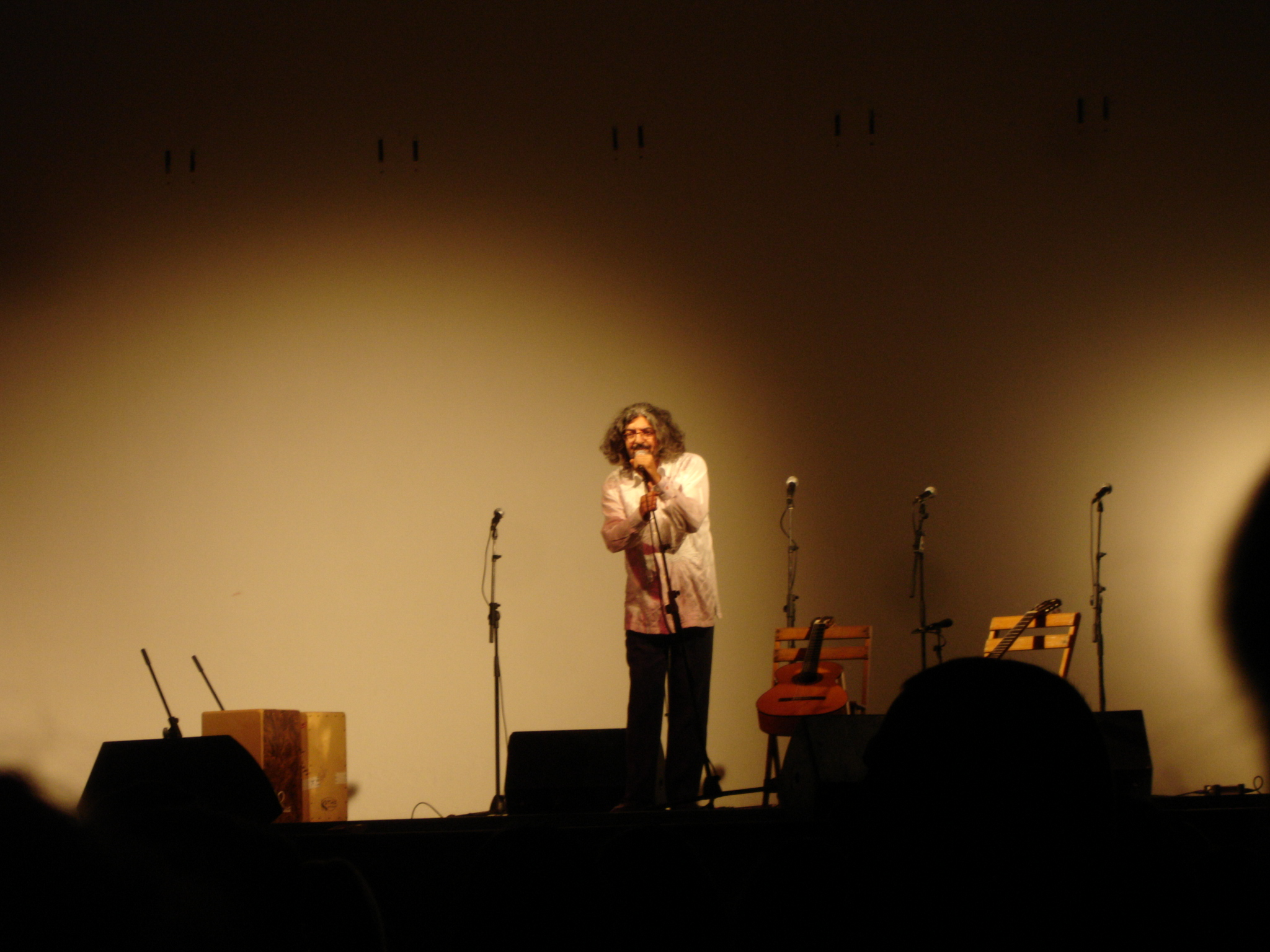 Moraito Chico. Flamenco show in Jerez de la Frontera, Andalusia (Spain)